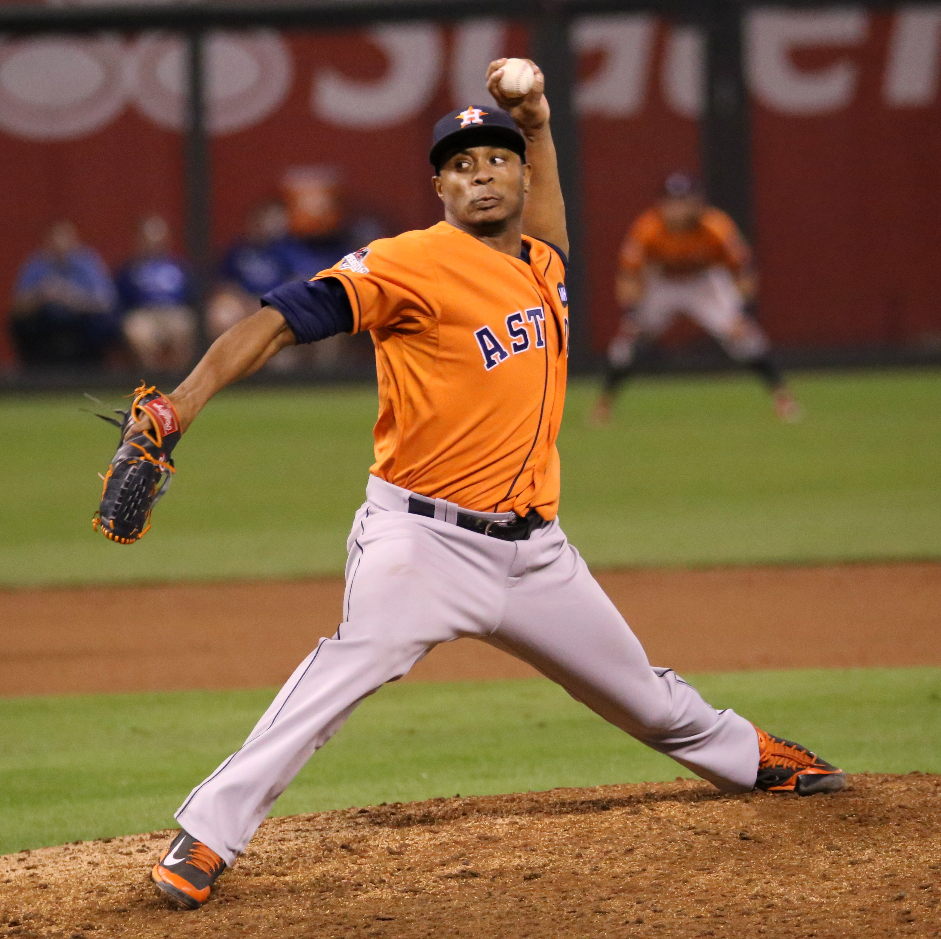 Tony Sipp